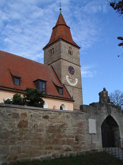 Veitsbronn bei Fürth, Kirche mit Wehrmauer (2003-11-23), v SW, groß.